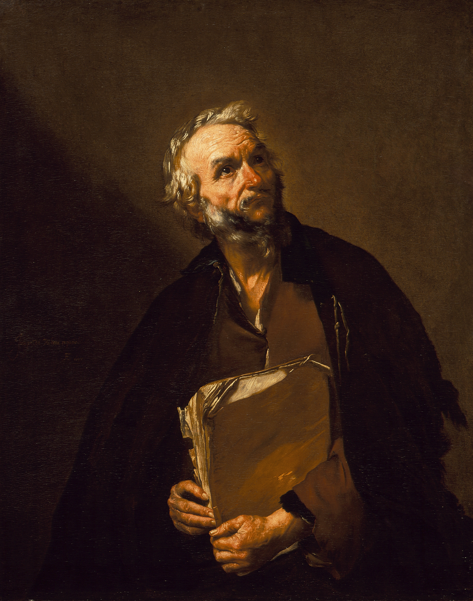 Platón